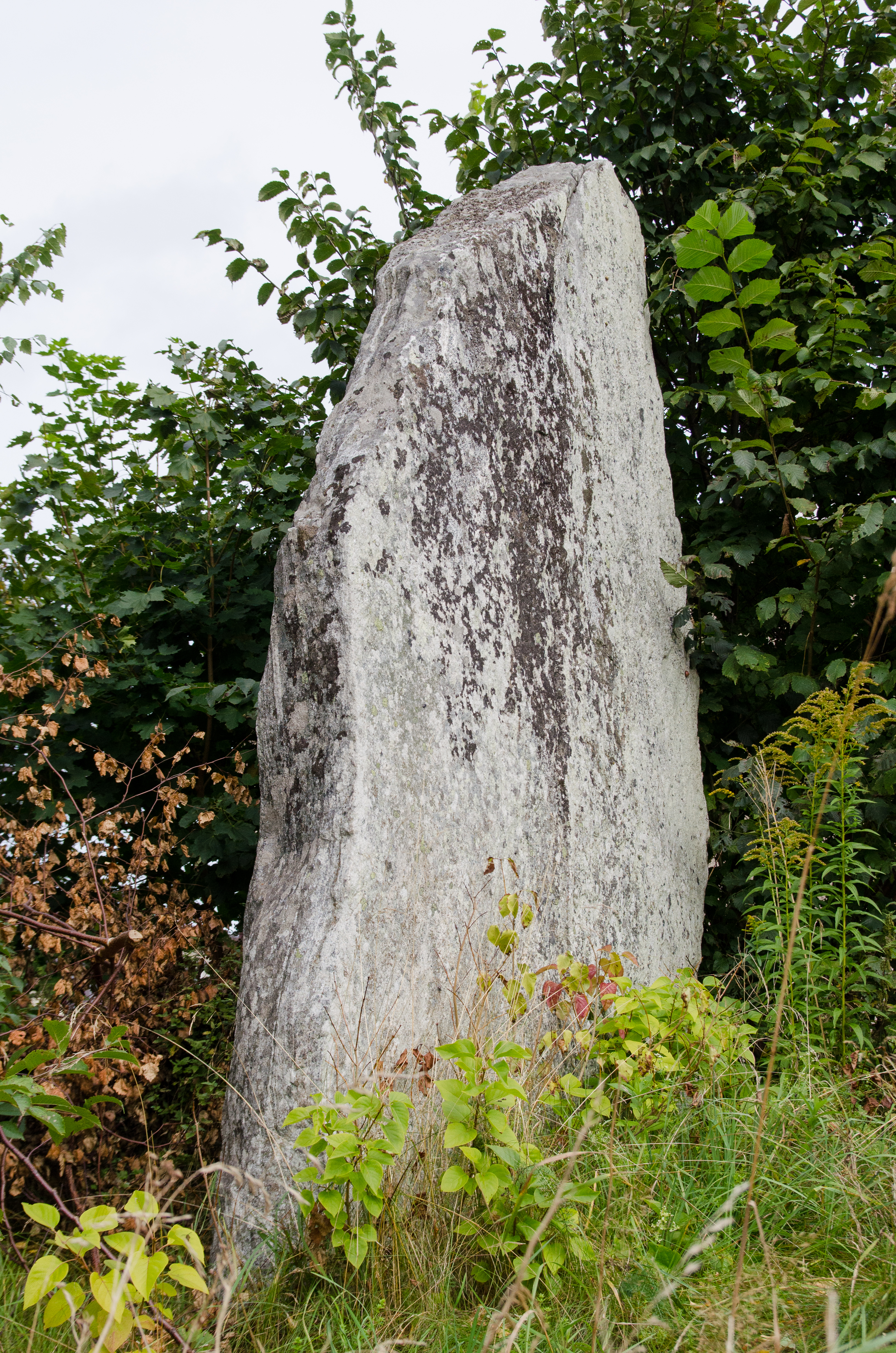 Grav markerad av sten/block.